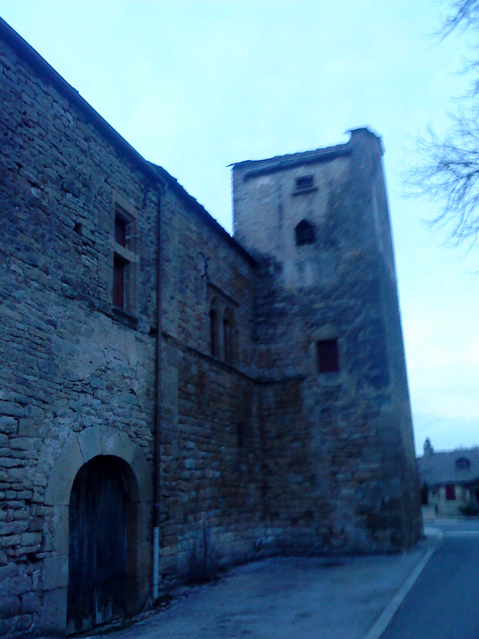 Ancienne commanderie hospitalière de Palhers (Lozère, France)